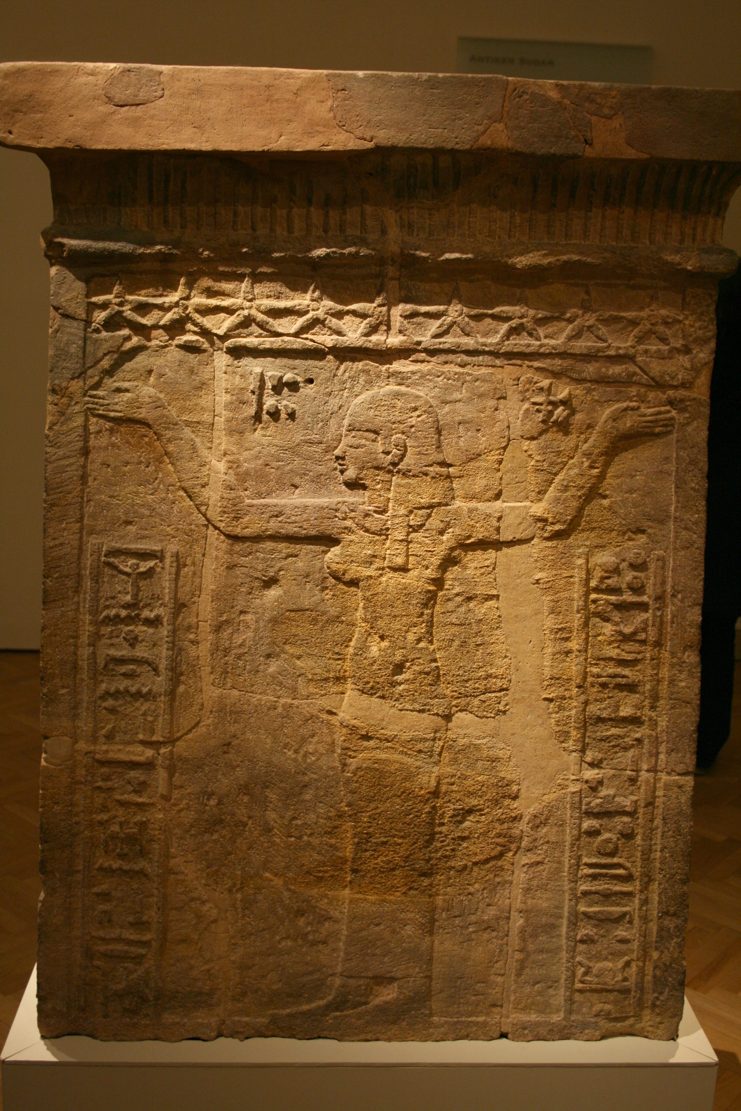 Barkenuntersatz des Natakamani und der Amanitore aus Wad Ban Naga (heute: Ägyptisches Museum Berlin, Inv. Nr. 7261)